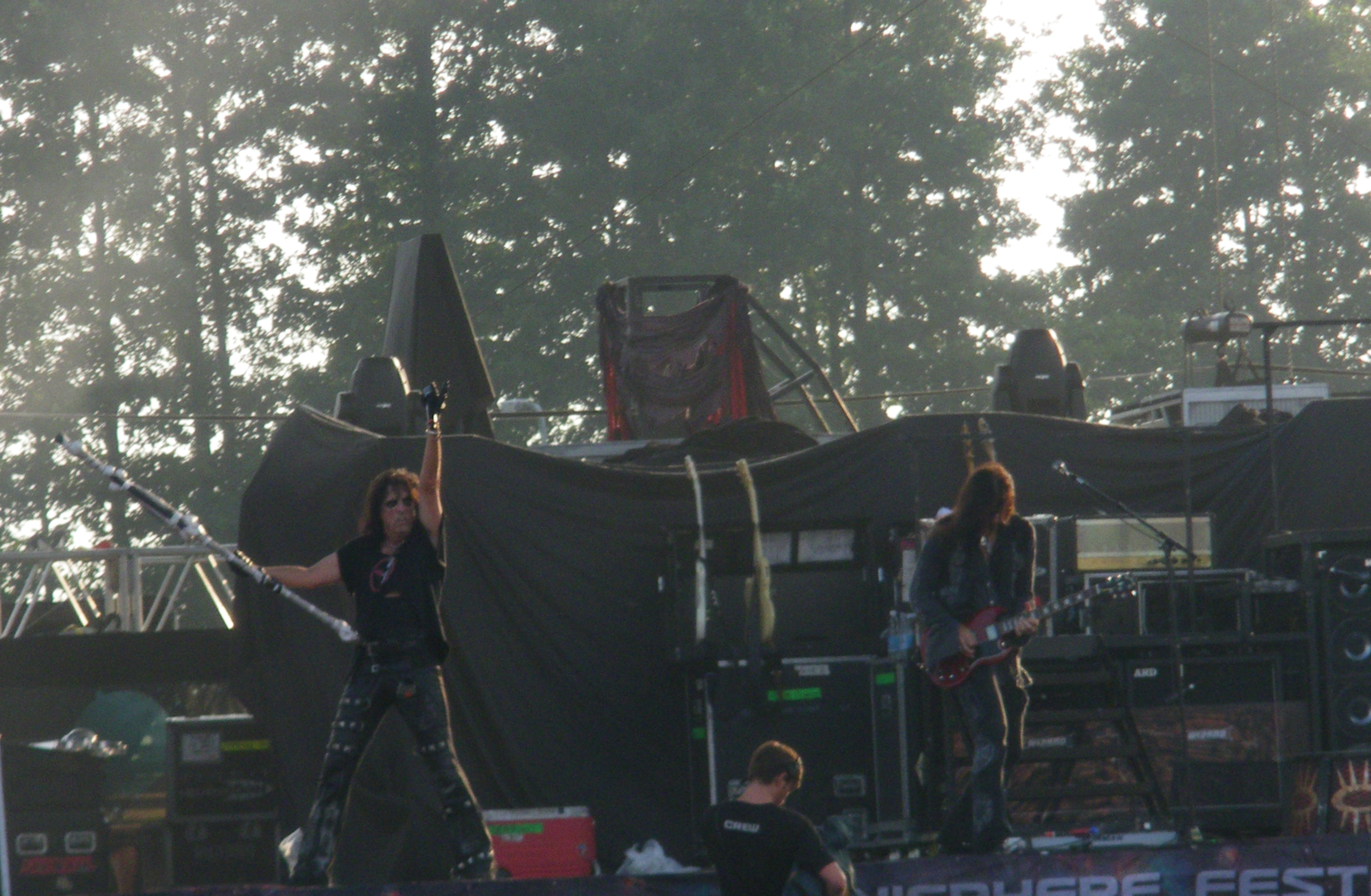 Alice Cooper / Sonisphere Festival 8. august 2010, Pori, Fínsko